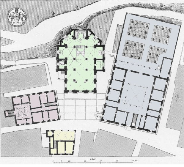 Piazza Pio II